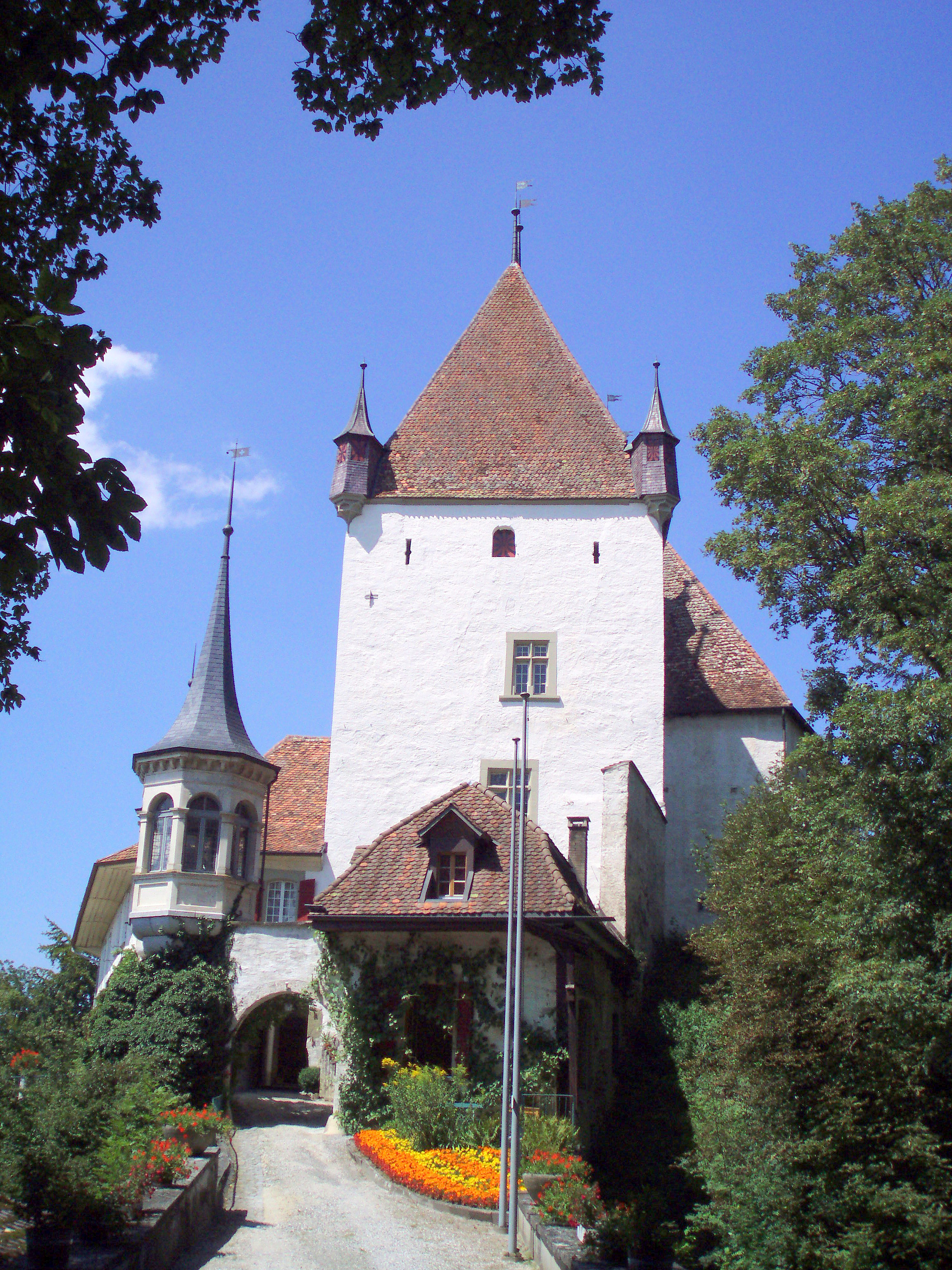 Kasteel Worb gezien vanaf de toegangsbrug.